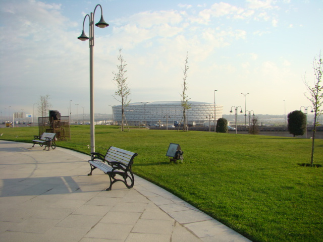 Musiqili alov fəvvarəsinin yanından Bakı Olimpiya Stadionunun görünüşü